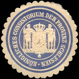 Sealing stamp Title: Königliches Consistorium der Provinz Schlesien Description: hellblau, weiß, geprägt Place: Breslau size: 3 cm